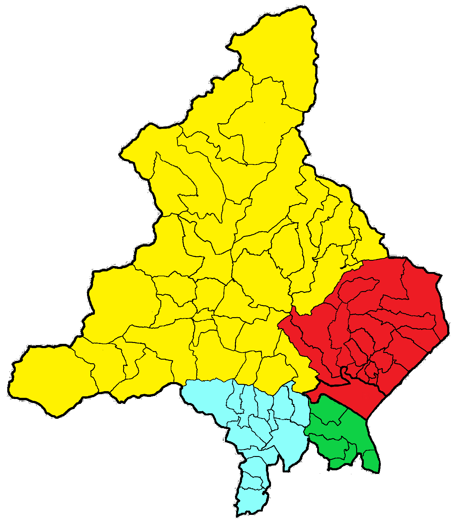 Mappa cromatica dei territori costituenti la provincia del Verbano Cusio Ossola (Verbania): rosso per il Verbano, azzurro per il Cusio, giallo per l'Ossola e verde per il nord Vergante